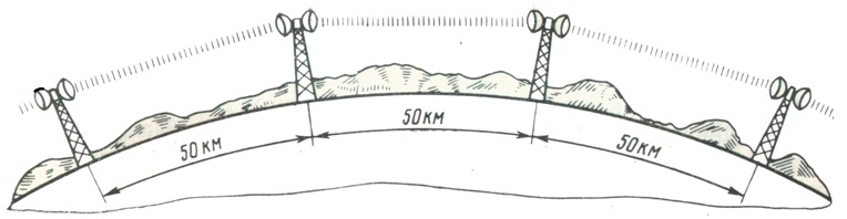 "Радиорелейни линии"